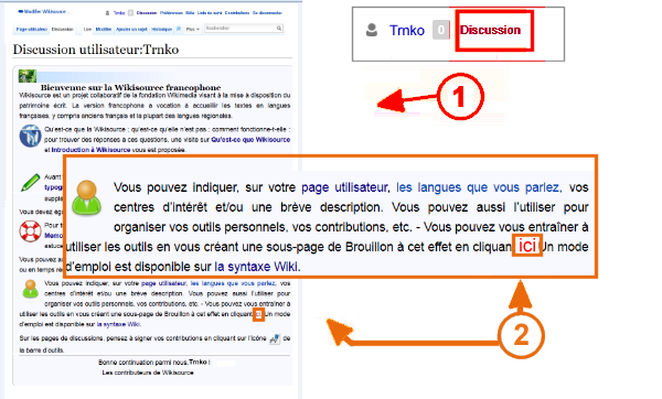 Accès au "bac à sable"